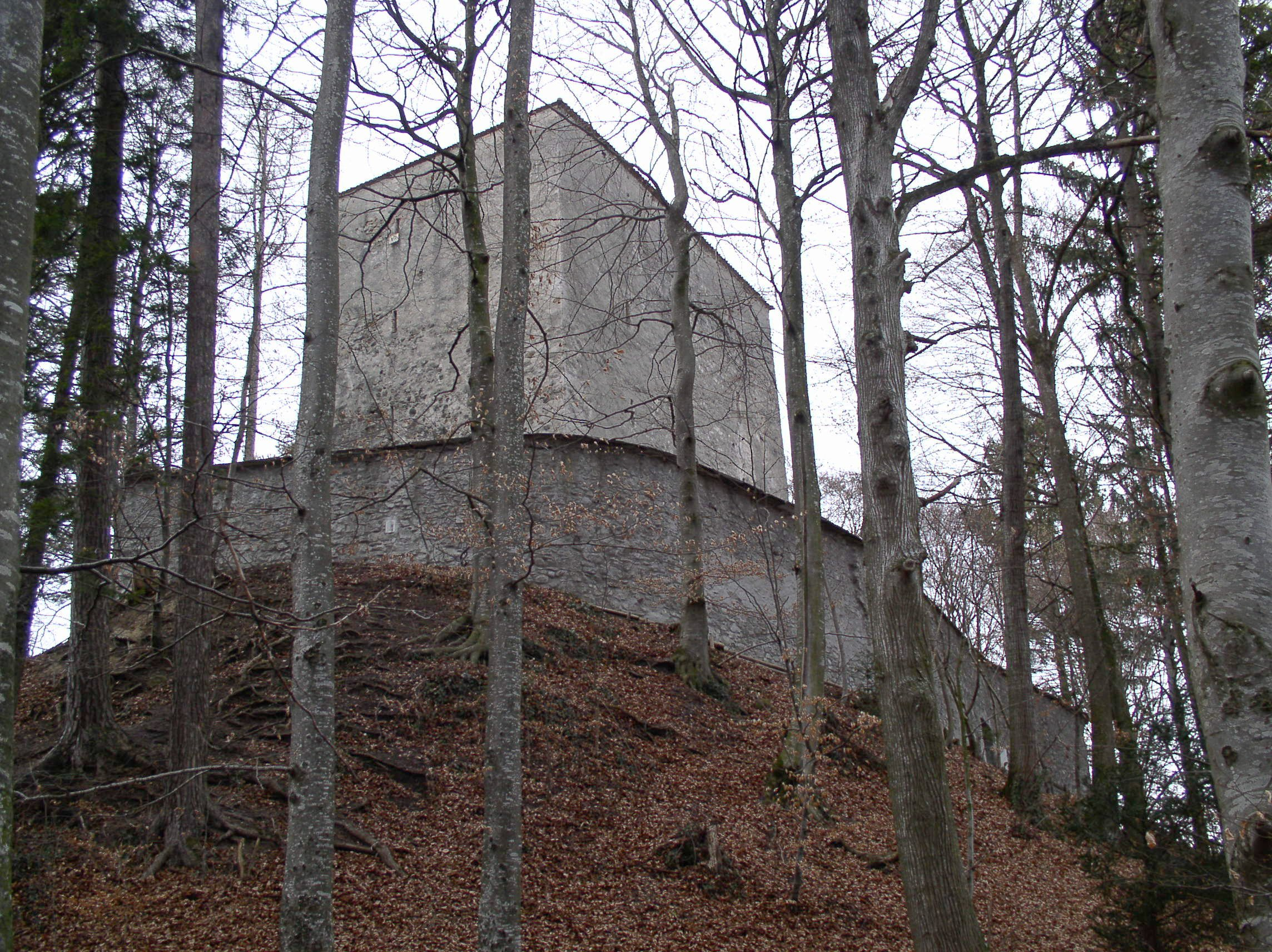 Der Strättligturm oberhalb des Dorfes Gwatt in der Gemeinde Thun, Kanton Bern, Schweiz